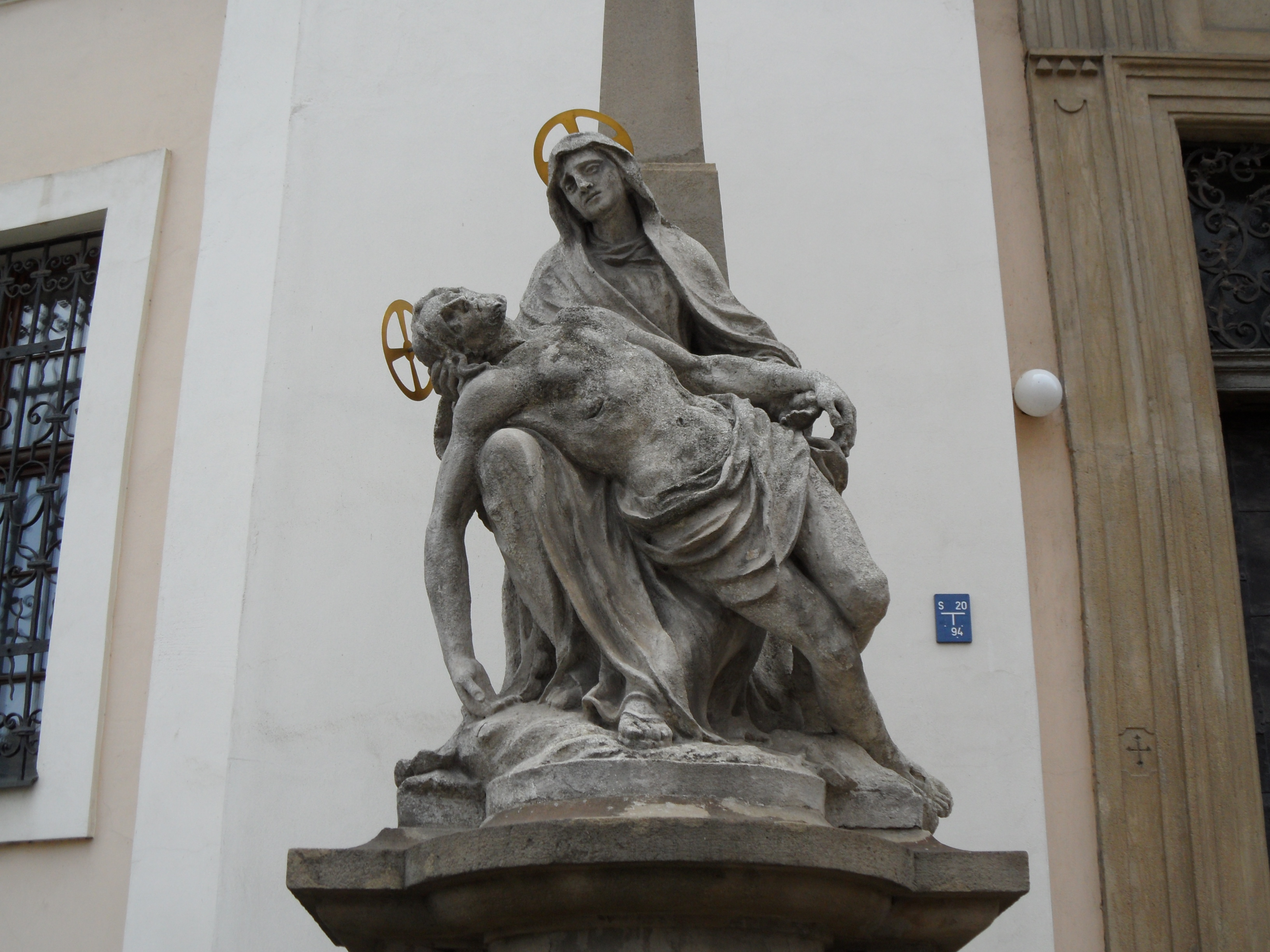 Pieta, Brno-Štýřice (1799) - Ondřej Schweigl